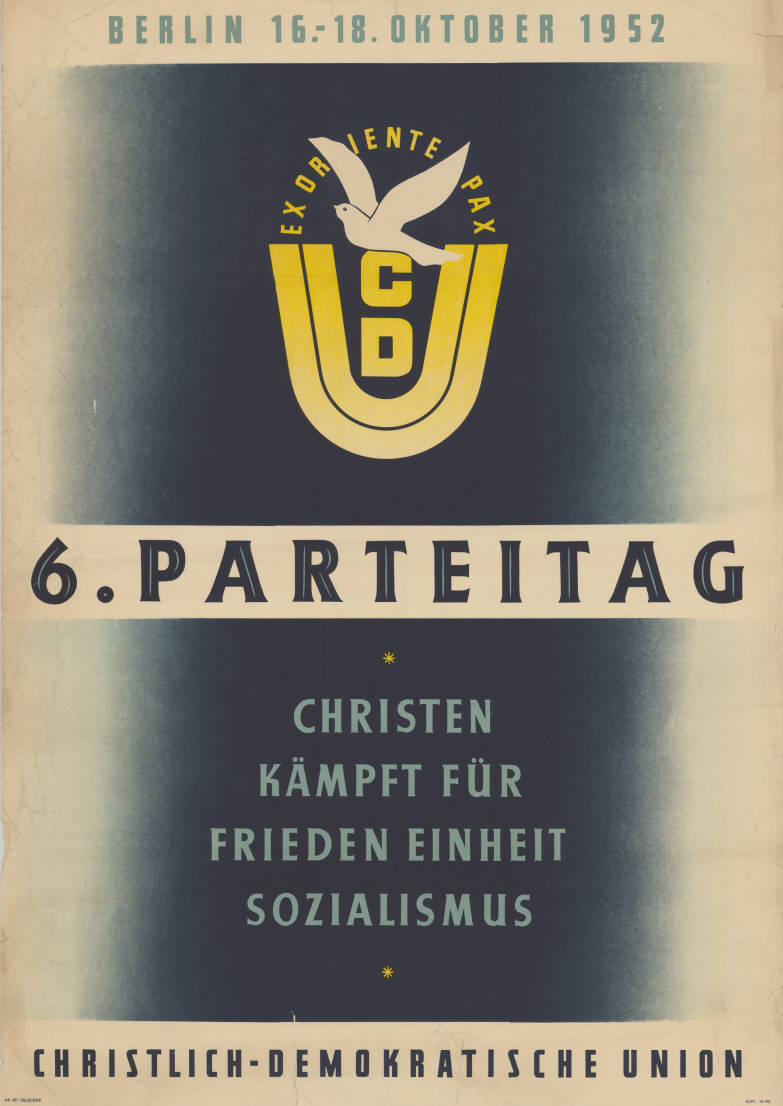 Berlin ... CDU 6. Parteitag Christen kämpft für ... Frieden Einheit Sozialismus Christlich-Demokratische Union Abbildung: Parteilogo Plakatart: Motiv-/Textplakat Auftraggeber: CDUD Drucker_Druckart_Druckort: AfI 491 766/52/DDR III/9/1 10 195 Objekt-Signatur: 10-024 : 3115 Bestand: Plakate aus der SBZ/DDR (10-024) GliederungBestand10-18: Ost-CDU / CDUD / Exil-CDU Lizenz: KAS/ACDP 10-024 : 3115 CC-BY-SA 3.0 DE